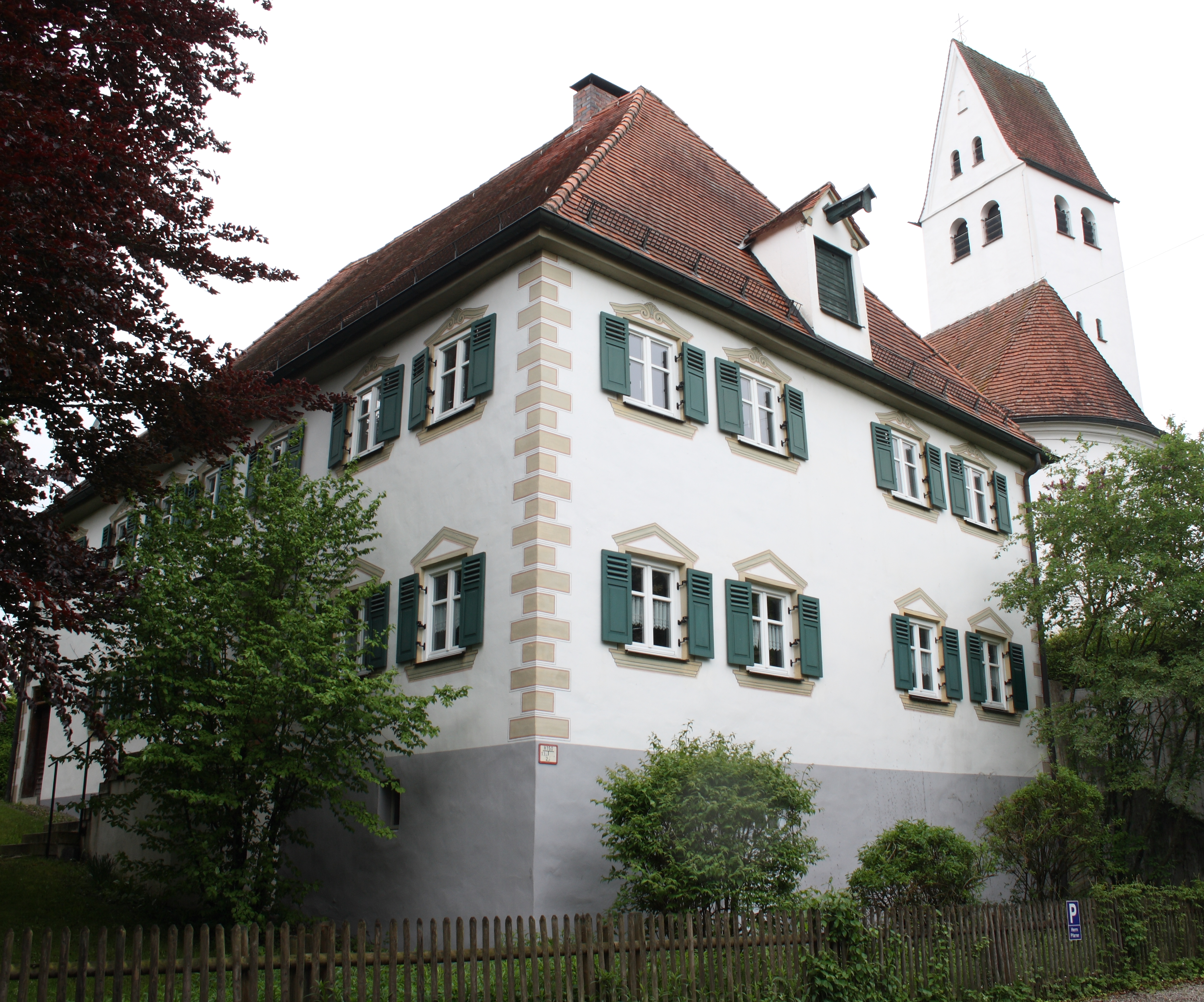 katholisches Pfarrhaus in Altenbaindt, einem Ortsteil von Holzheim im Landkreis Dillingen an der Donau